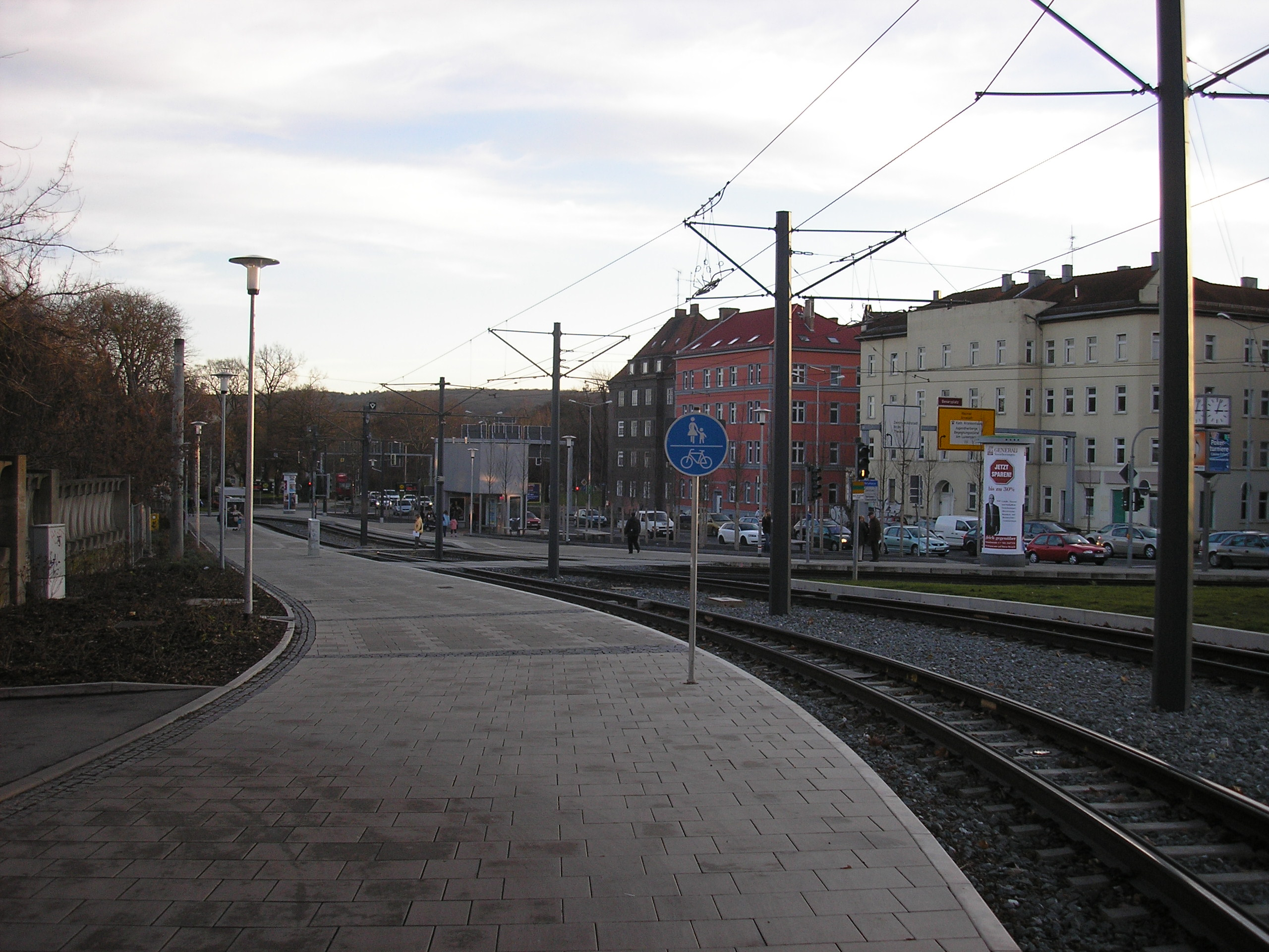 Blick über den Gothaer Platz in Erfurt.